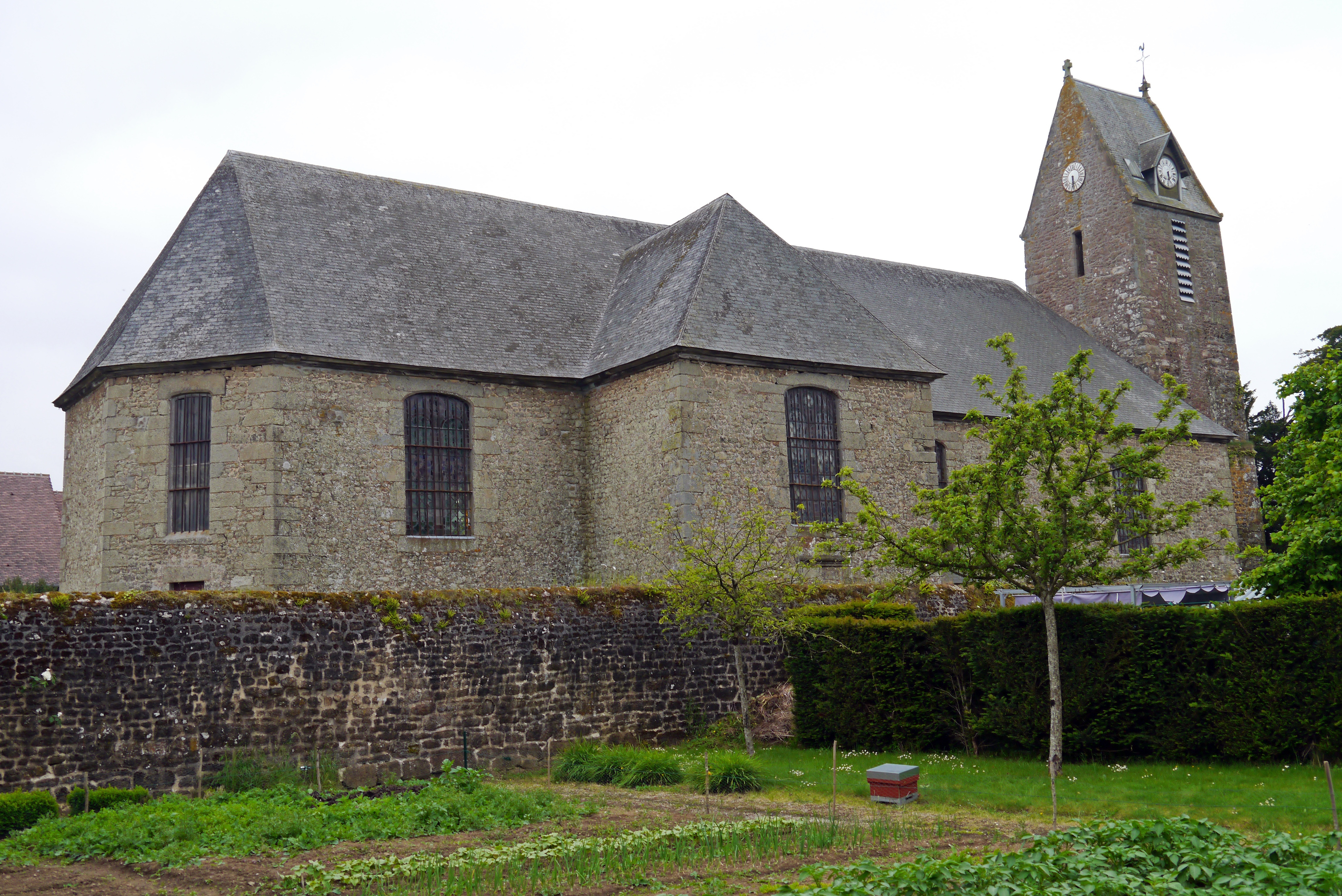 Dompierre, Orne, France. Église Saint-Pierre.